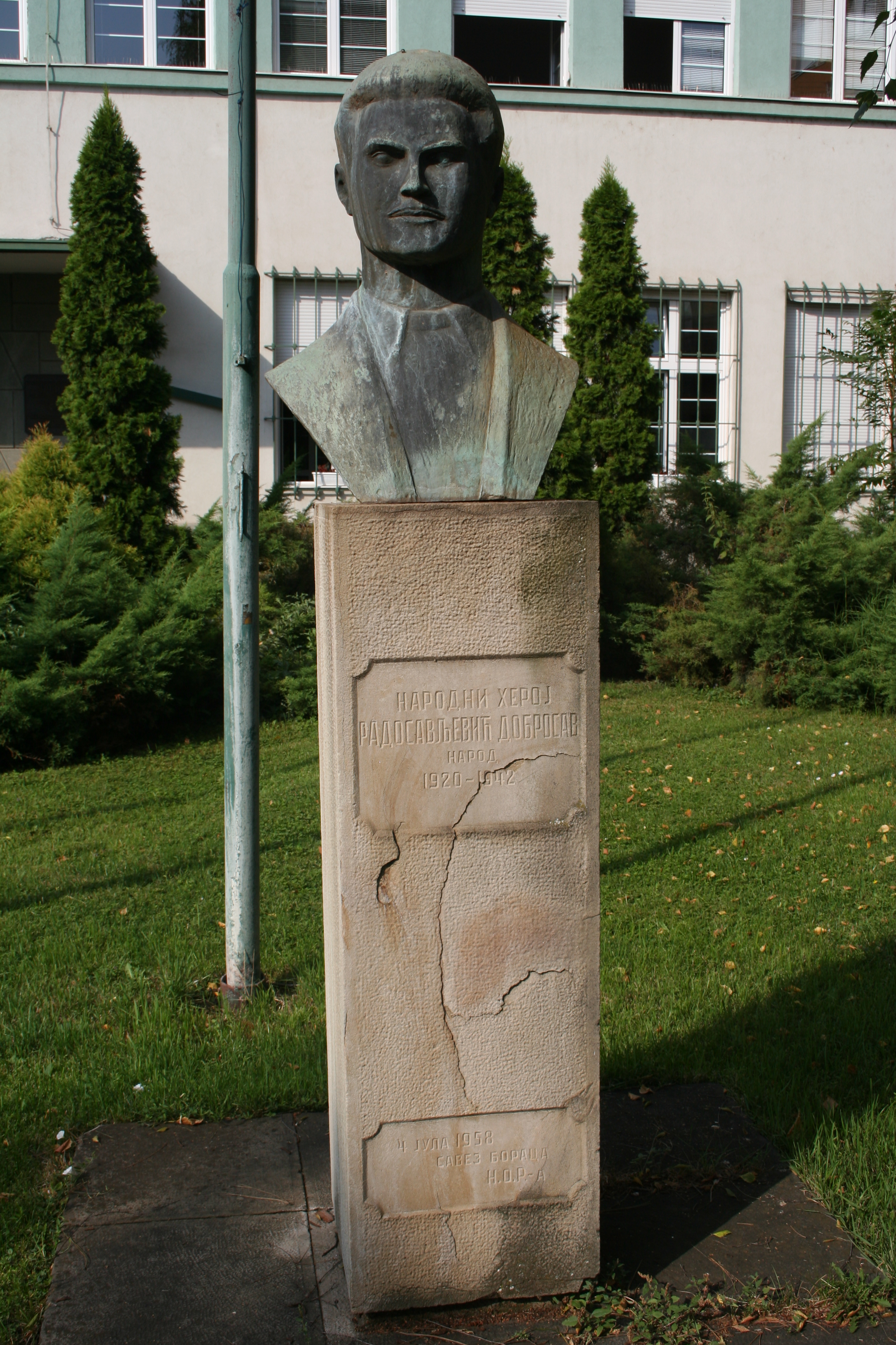 Spomenik u parku ispred zgrade pošte u Šapcu